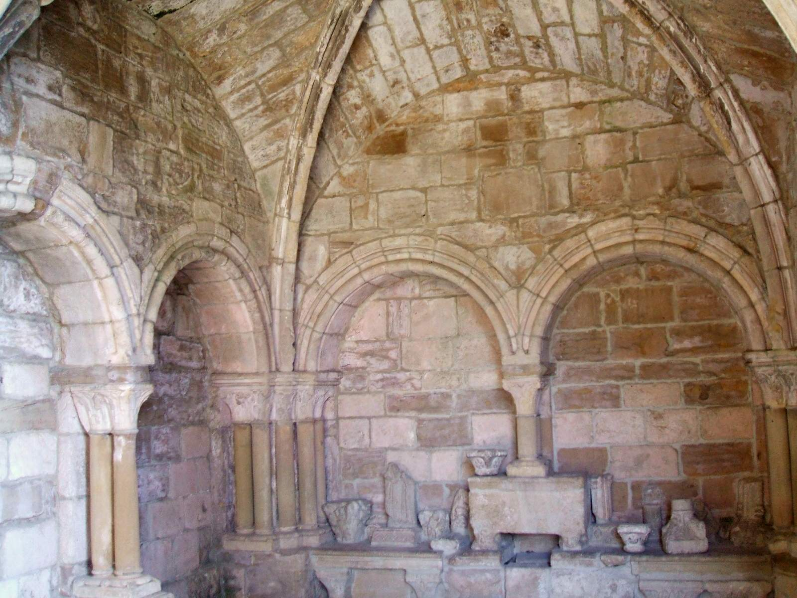 Claustro de la Iglesia de San Pedro de la Rúa (Estella)